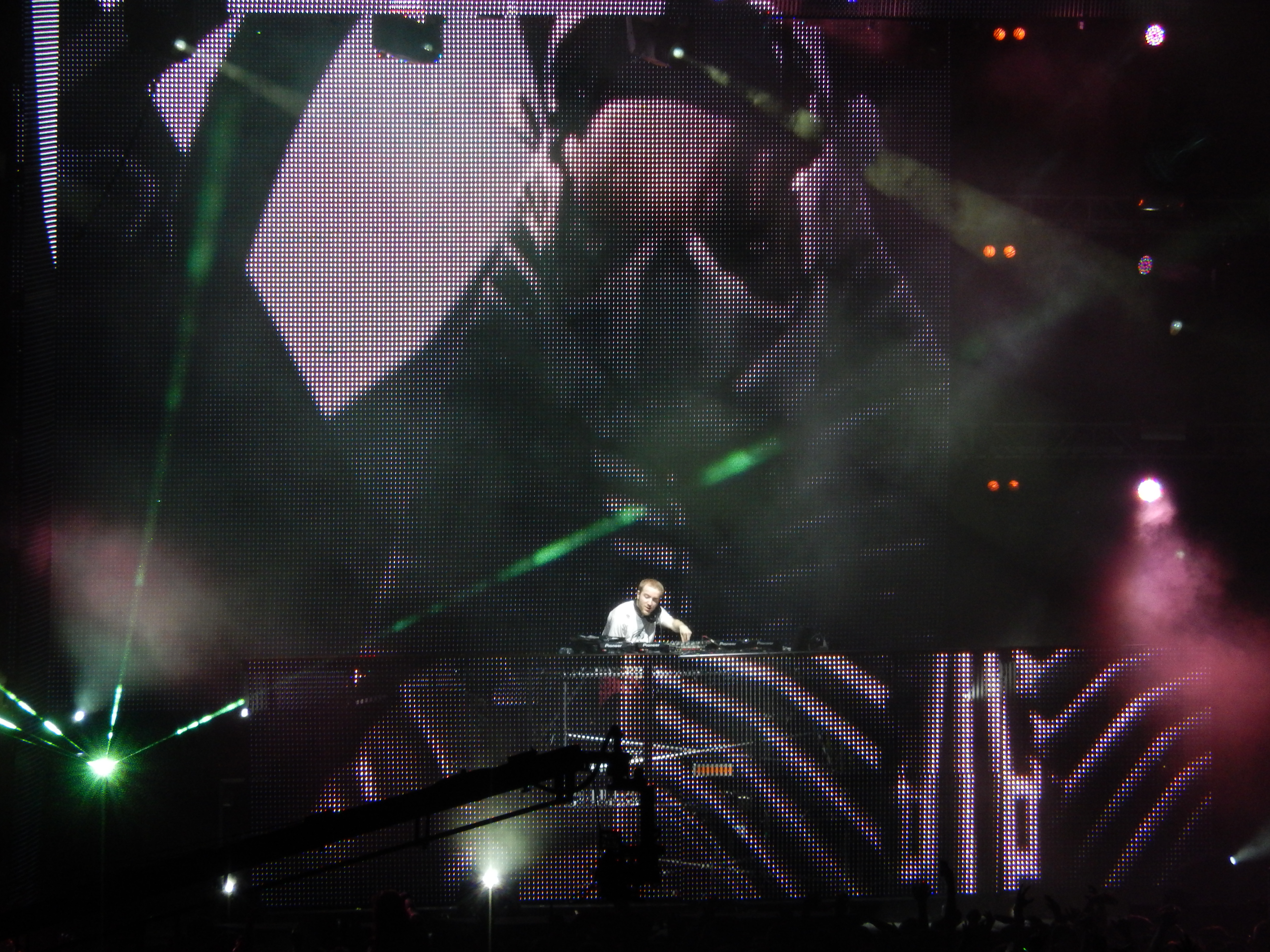 Excision